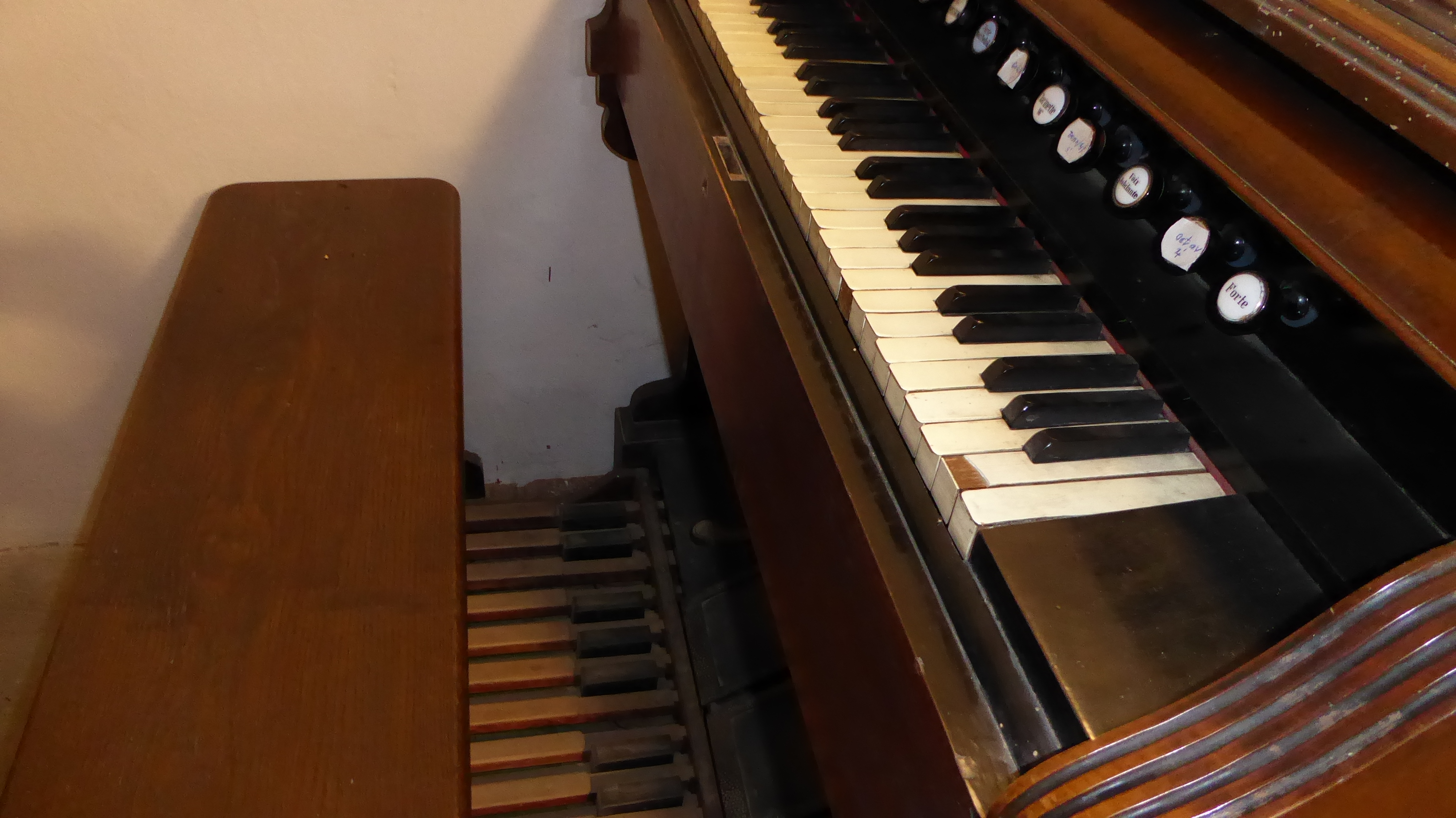 Jednomanuálové harmonium s pedálem, Děčín, Kaple PMSD